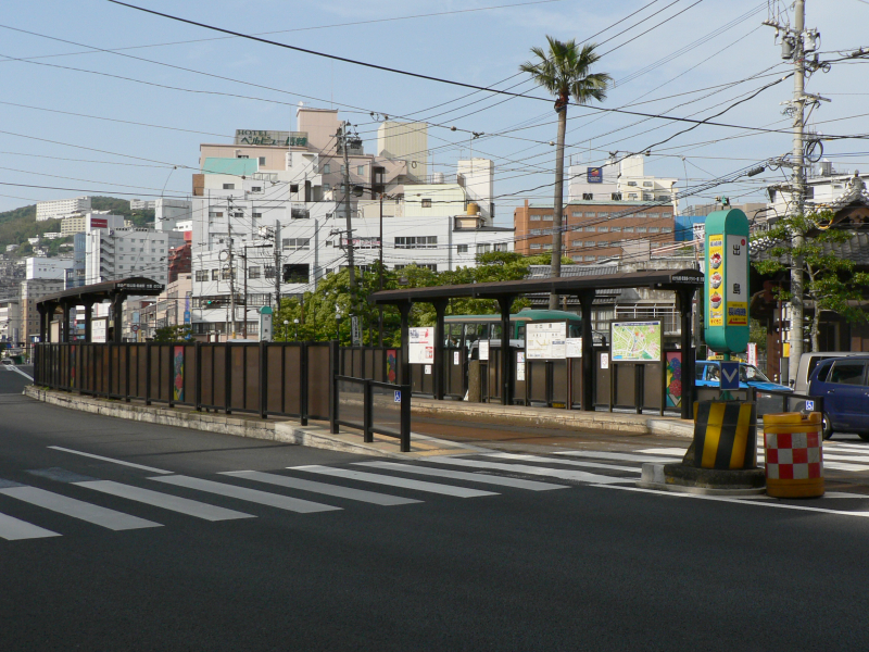 長崎電気軌道、出島電停